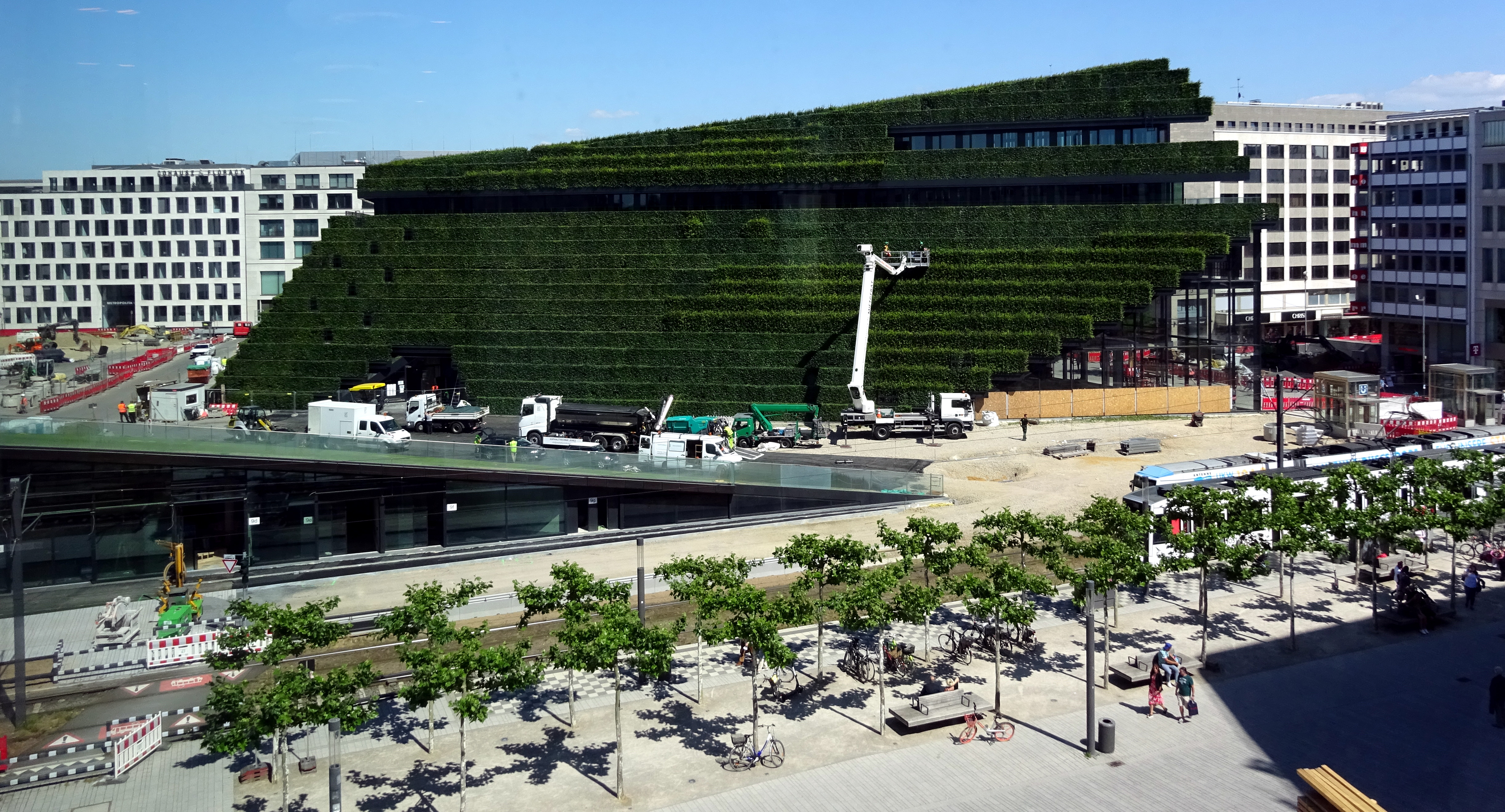 Ingenhoven-Tal in Düsseldorf im Bau, Beschneidung der Hainbuchenhecken, Blick vom Breuninger